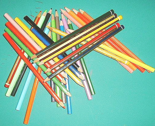 Source: Peng 15:39, 15 May 2005 (UTC) selbst fotografiert am 24.9.04, gnu-fdl, Bild:verschiedene Buntstifte aus Holz LIZENZ: Buntstift